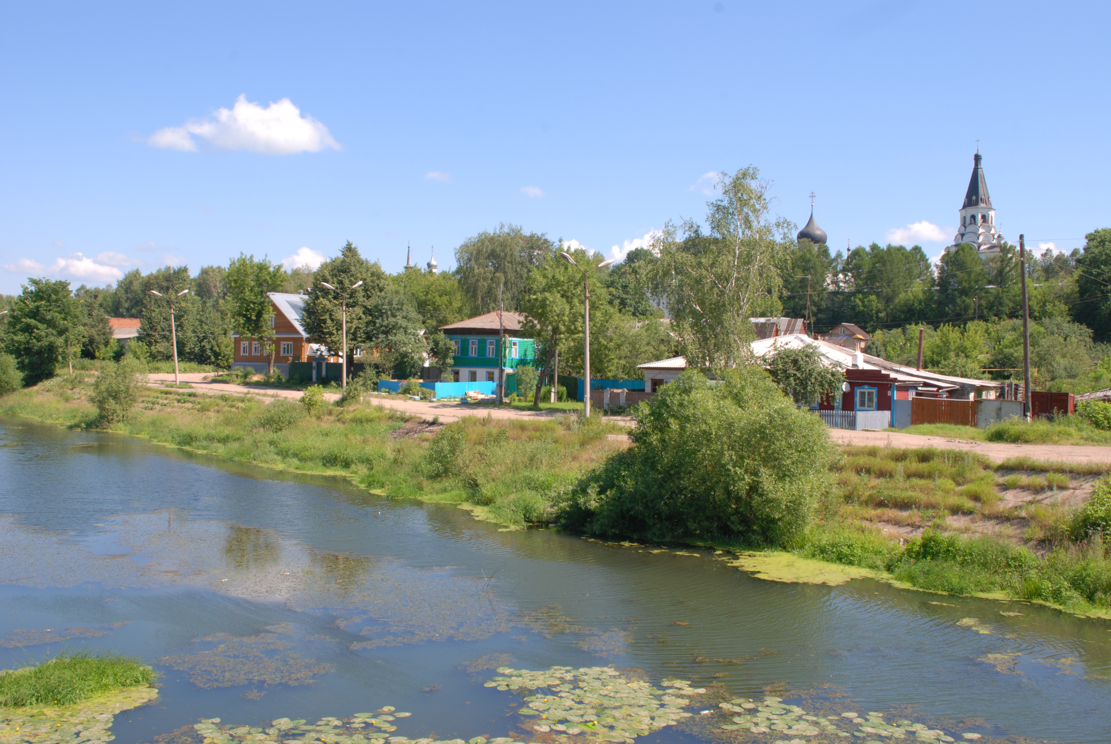 Ансамбль Успенского монастыря (Владимирская область, Александров, Советская улица, 23, 25 (Музейный проезд, 18-20))